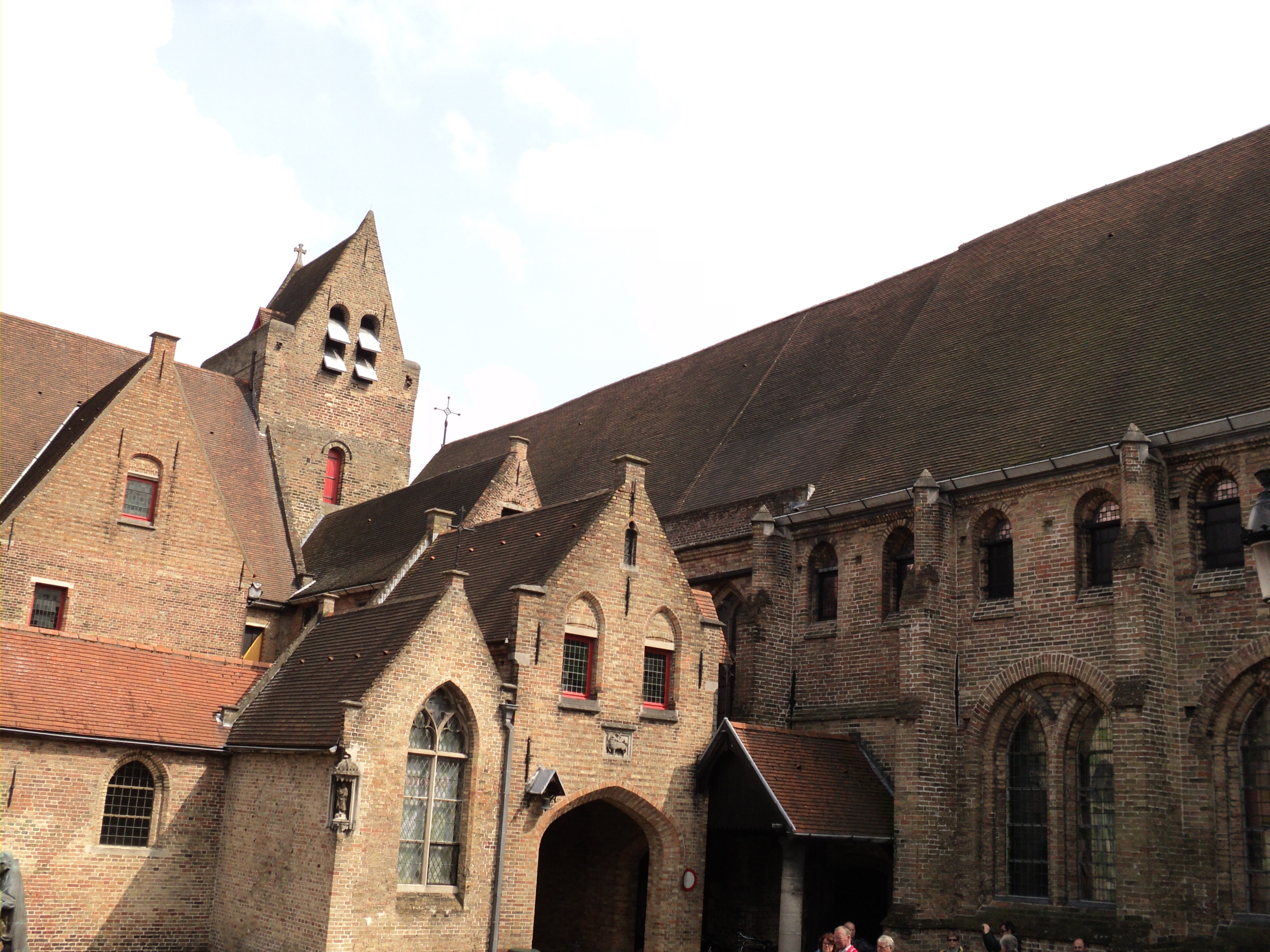 Brugge